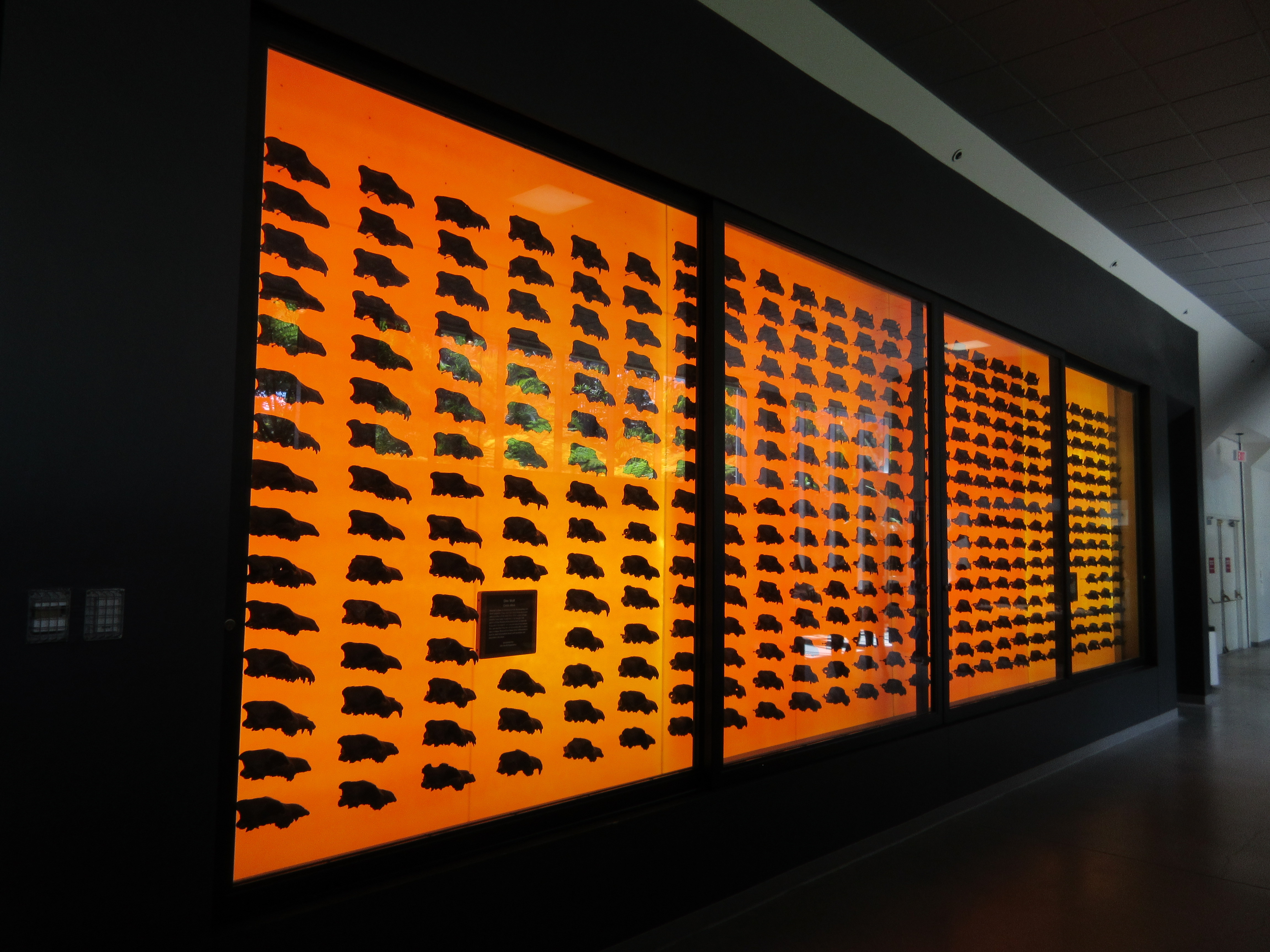 Dieses Bild ist besser als das davorige.